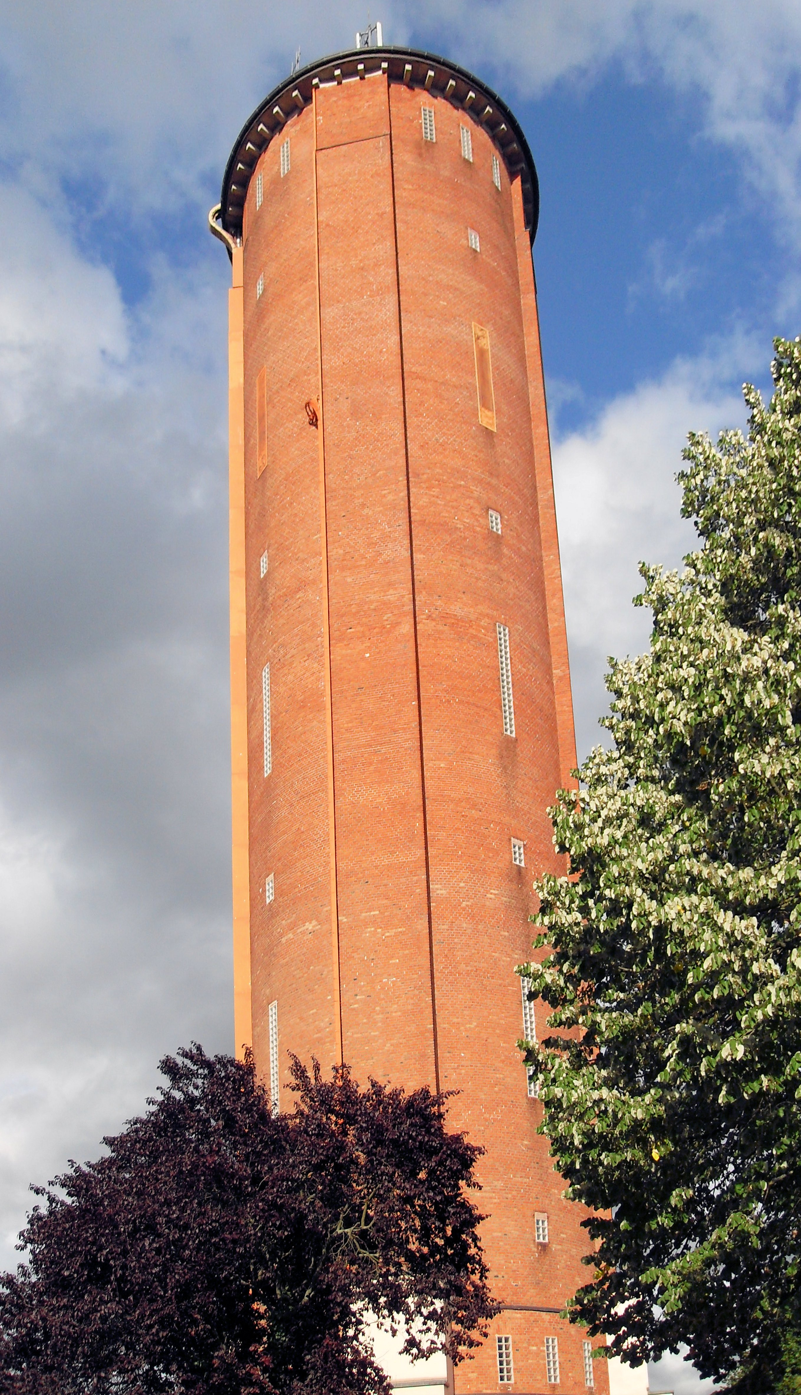 Réservoir de stockage de FEOGA à Ungersheim